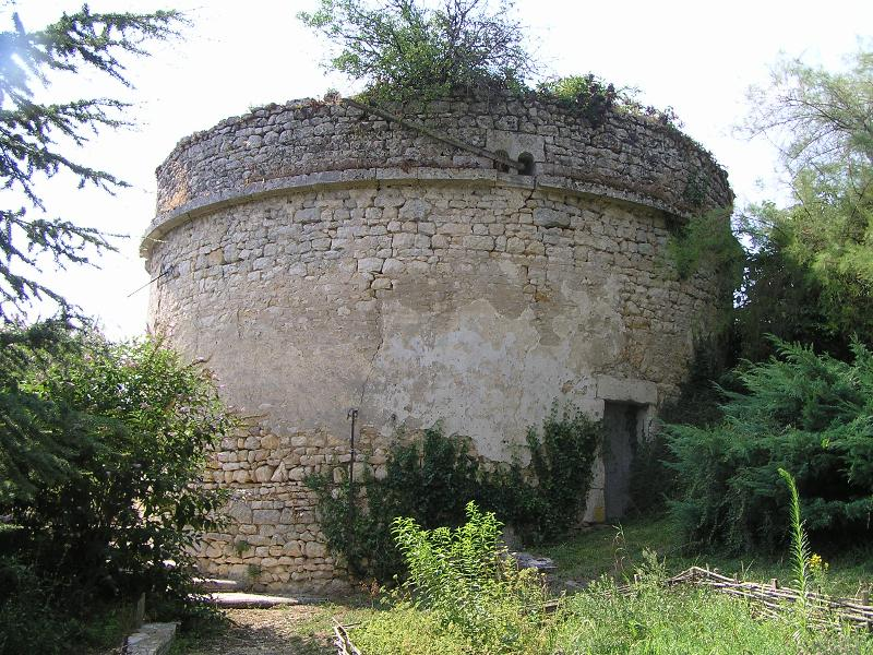 pigeonnier de Richemont (fin 16°)